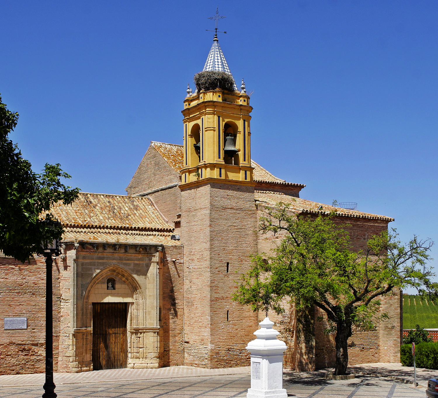 Iglesia parroquial San Jorge Mártir de Palos de la Frontera, Huelva, España.